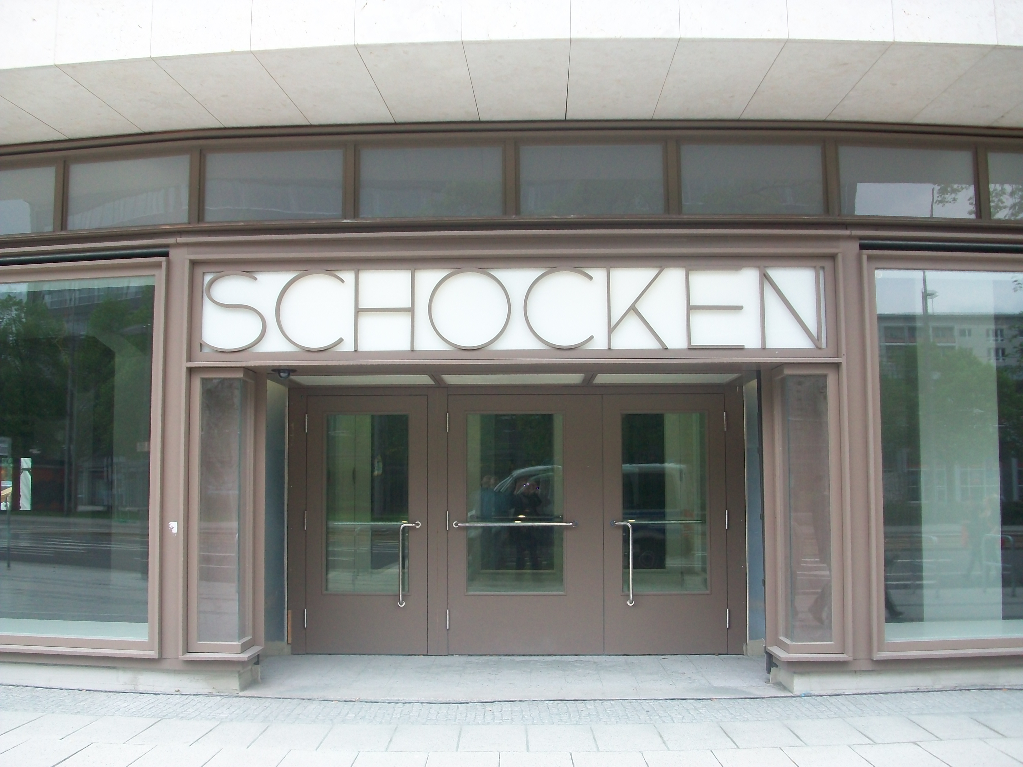 Rekonstruierter Eingangsbereich des ehem. Kaufhauses Schocken in Chemnitz, erbaut 1930 von Erich Mendelsohn. (Department store in Chemnitz, Germany, by Erich Mendelsohn. Built 1930.)